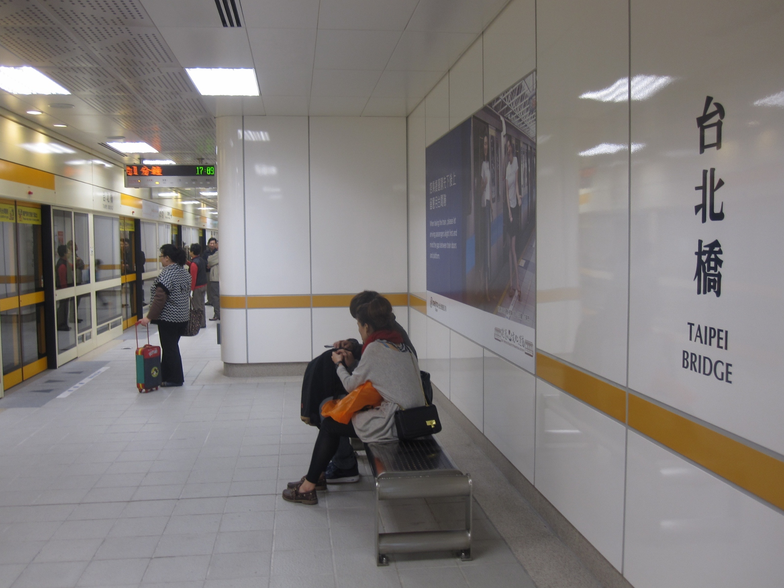 台北橋站月台2